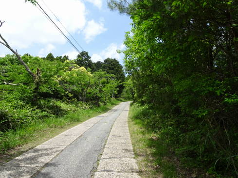 成相寺の参道（バス専用道路）